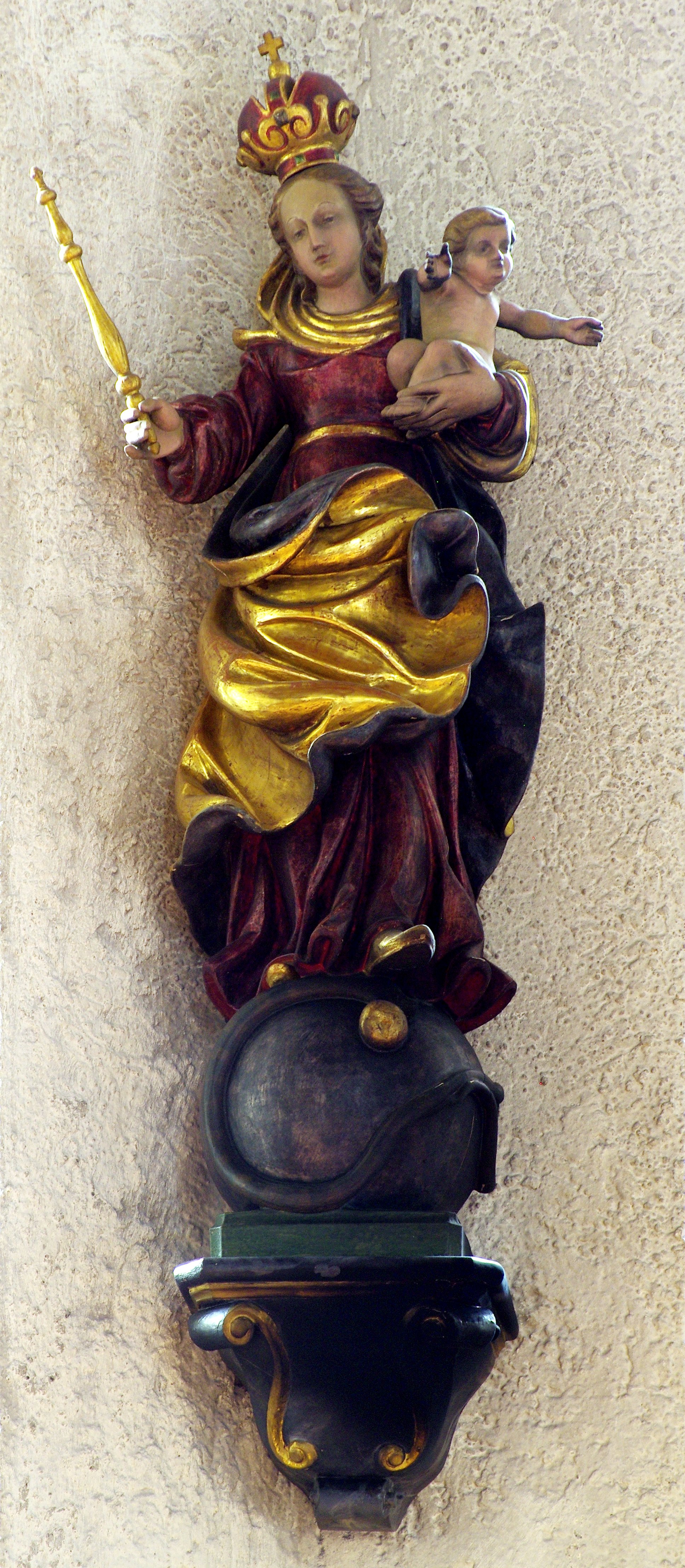 Die Pfarrkirche St. Martin in Vöhrenbach